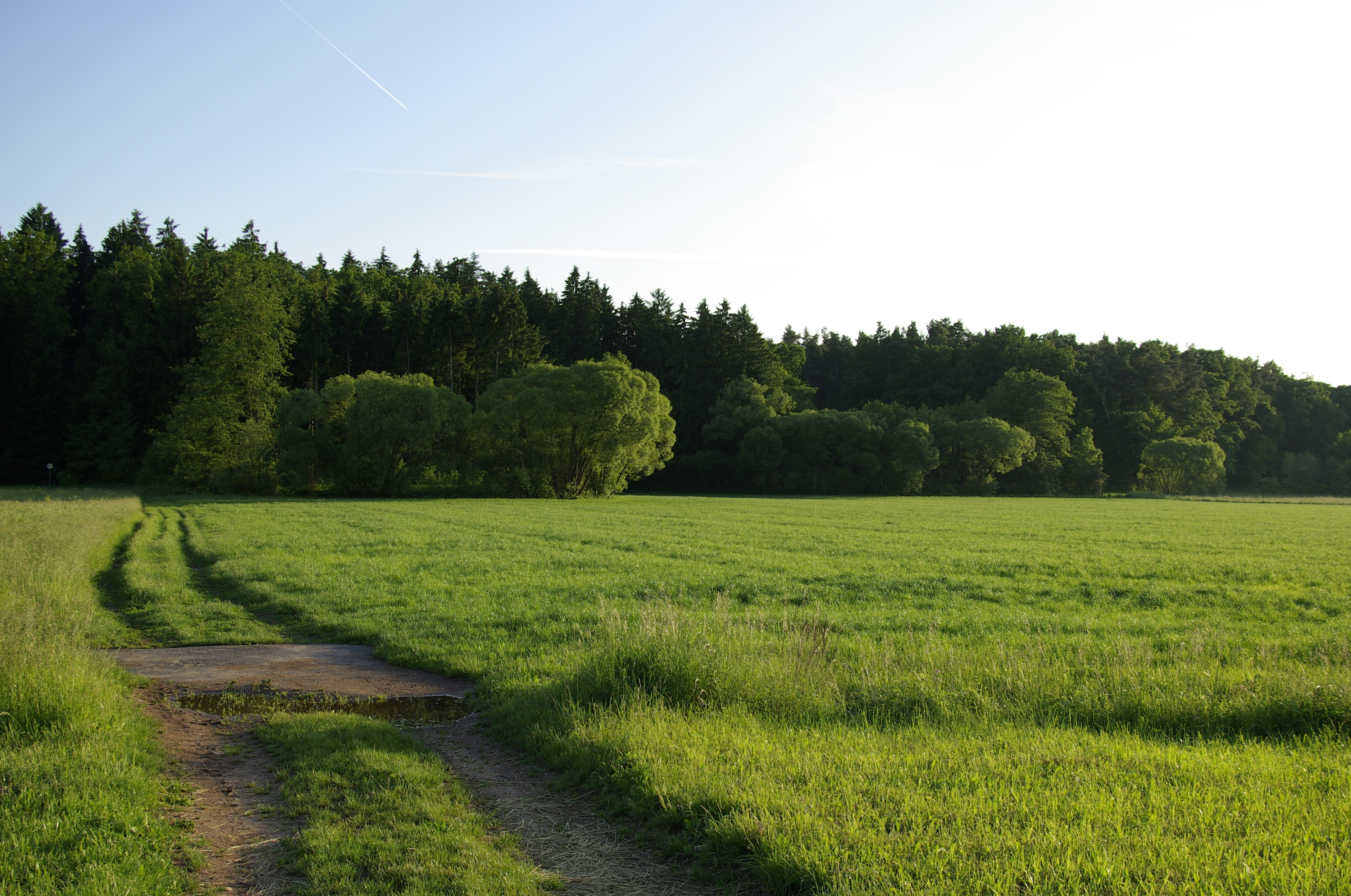 Das Zenntal bei Rothenberg (Obermichelbach), im Hintergrund der Zennwald.